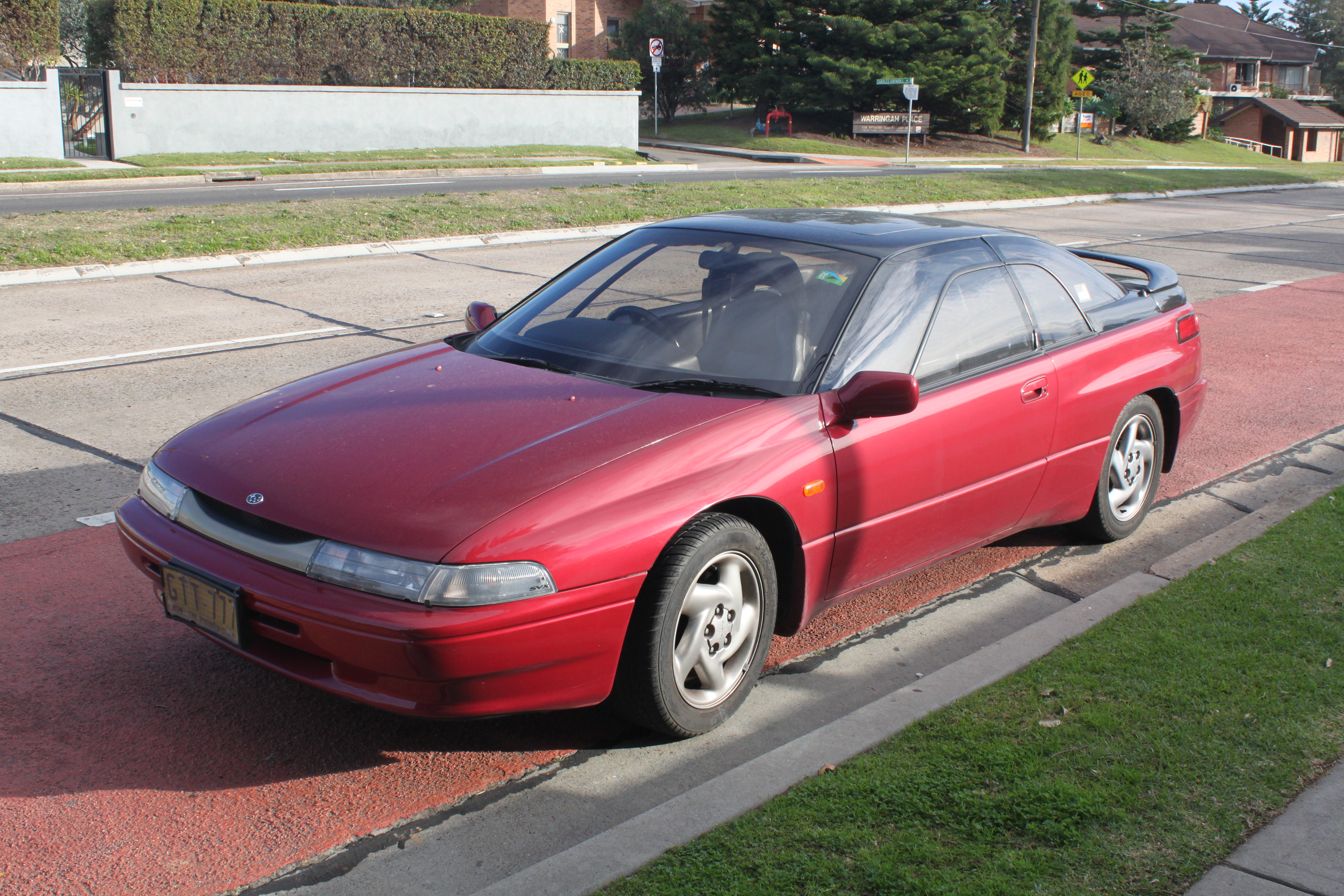 Subaru SVX